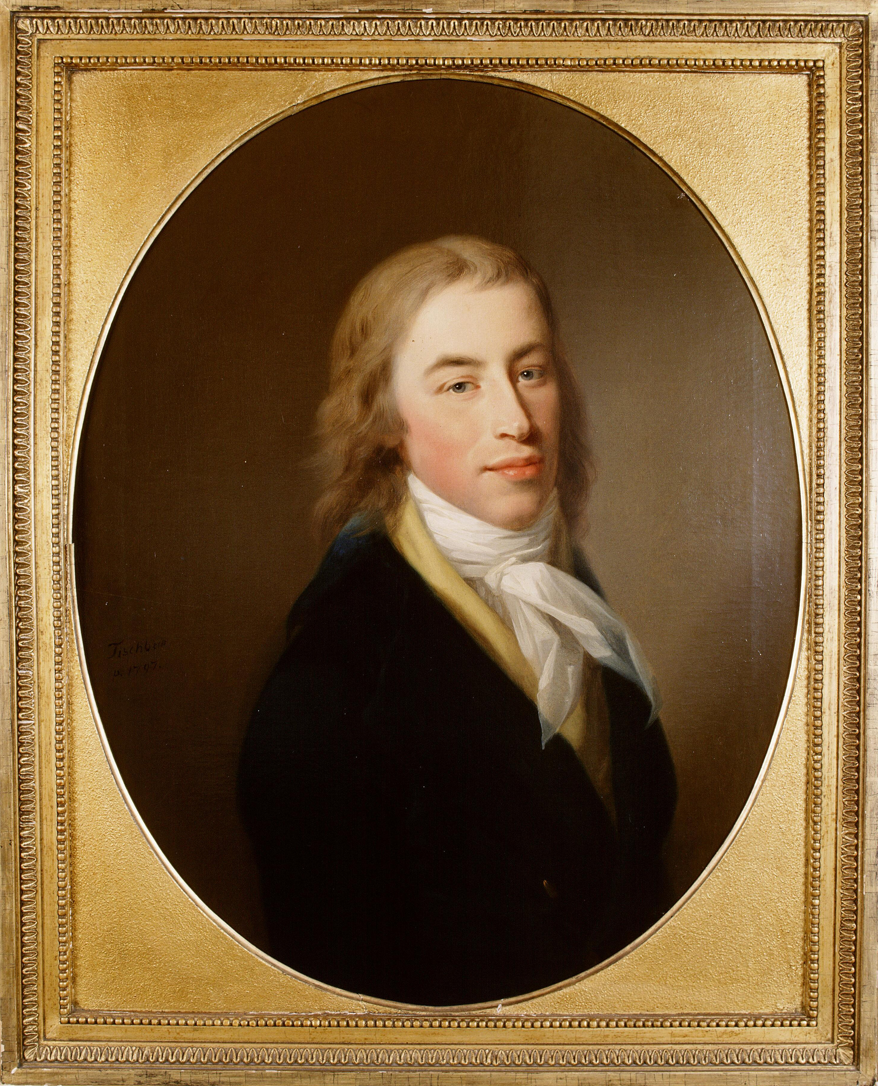 Mr. Andries Cornelis Willem Munter (1775-1861), politicus